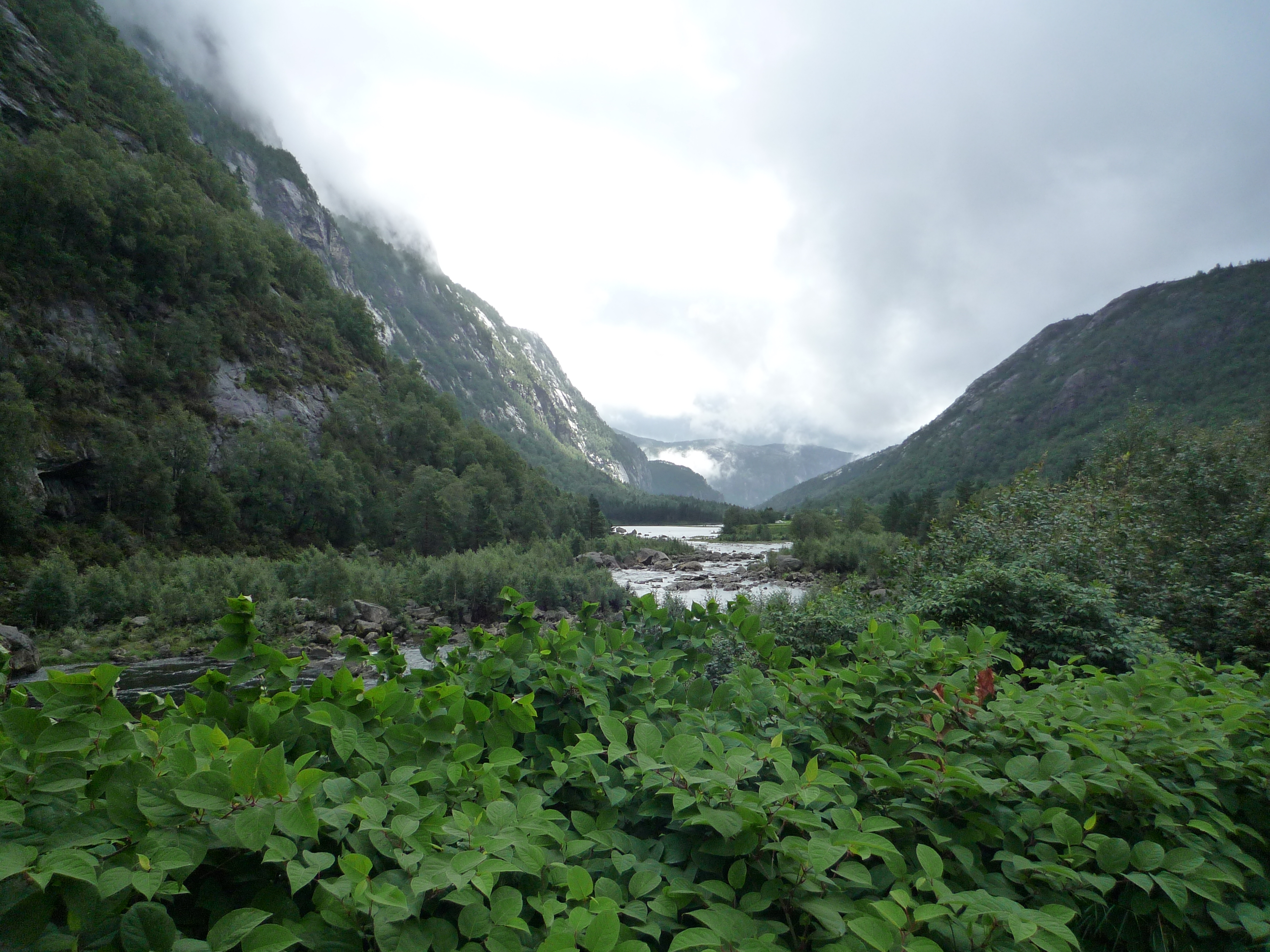 20110807 13 Tonstad